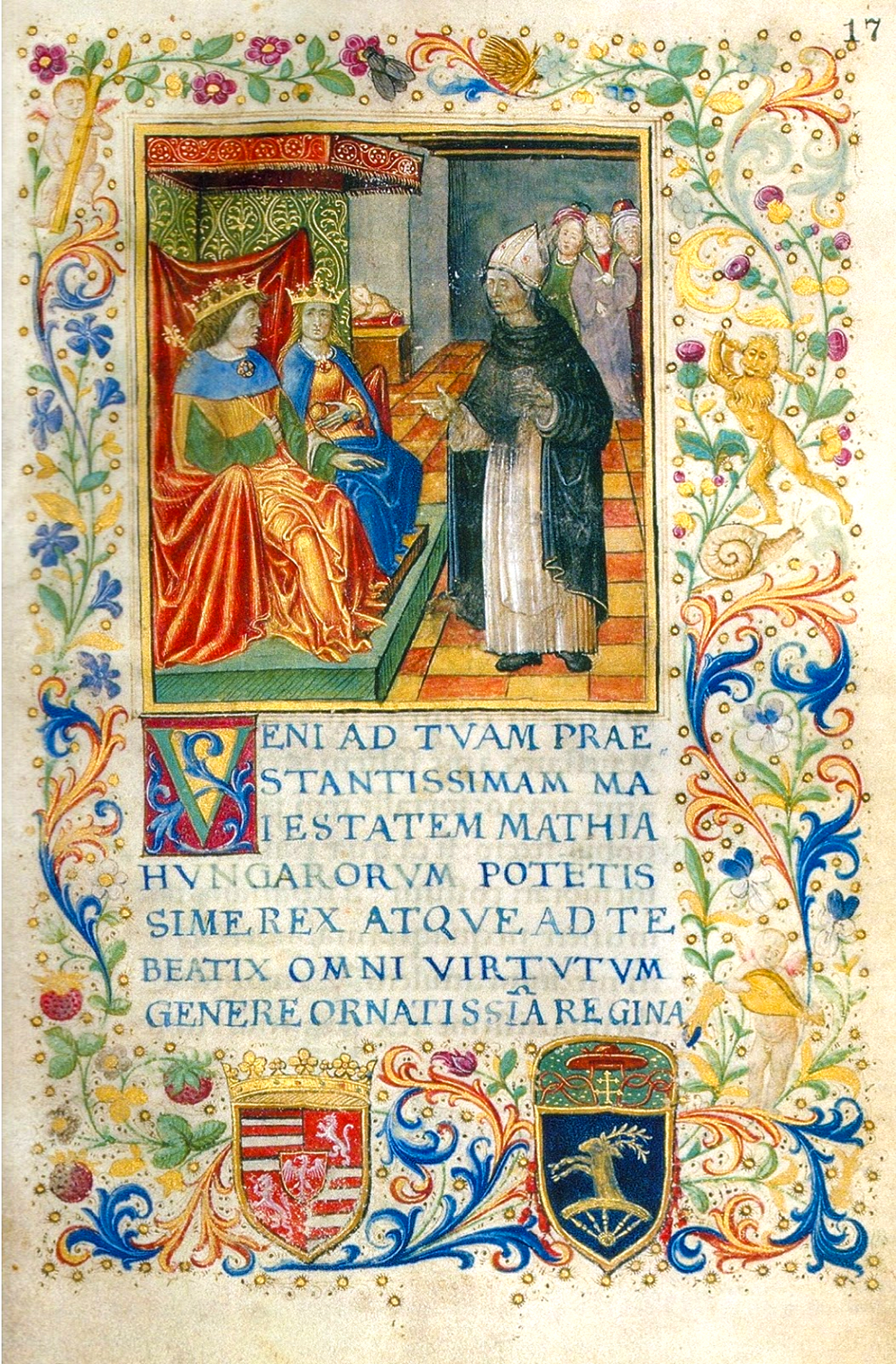 Petrus Ransanus nápolyi követ beszédet mond Mátyás és Beatrix előtt - miniatúra, 1480-as évek vége. A Ransanus - Corvina 1490 és 1492 között Nápolyban készült. Szerzője, Ransanus 1488-ban a Nápolyi Királyság követeként érkezett Budára. A miniatúra alatt II. Ulászló és Bakócz Tamás esztergomi érsek címere látható.